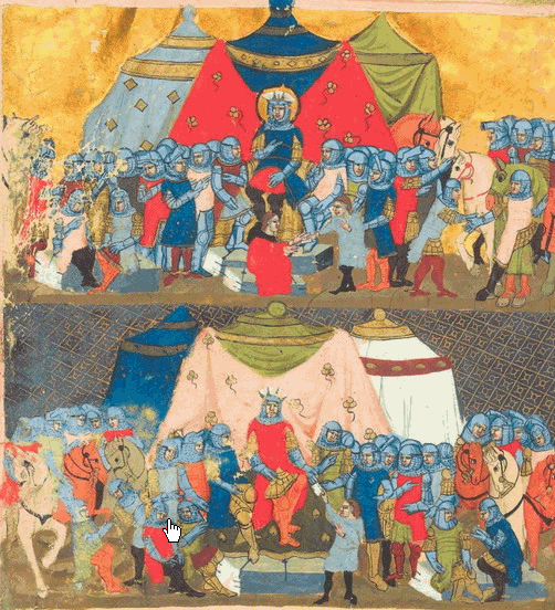 Dalimilova kronika - konflikt mezi sv. Václavem a kouřimským knížetem, nahoře Václav uprostřed svého vojska, dole zlický kníže Radslav